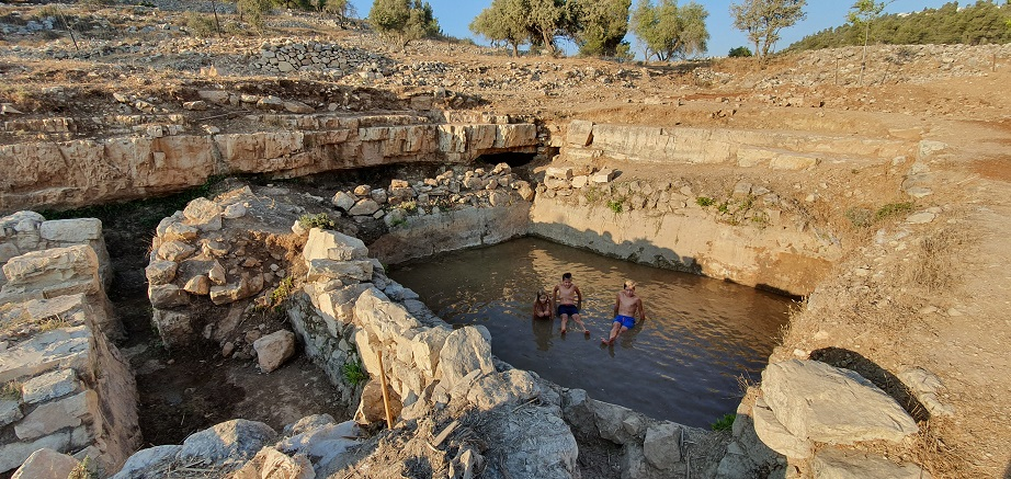 עין המסייעת 7020 - הבריכה